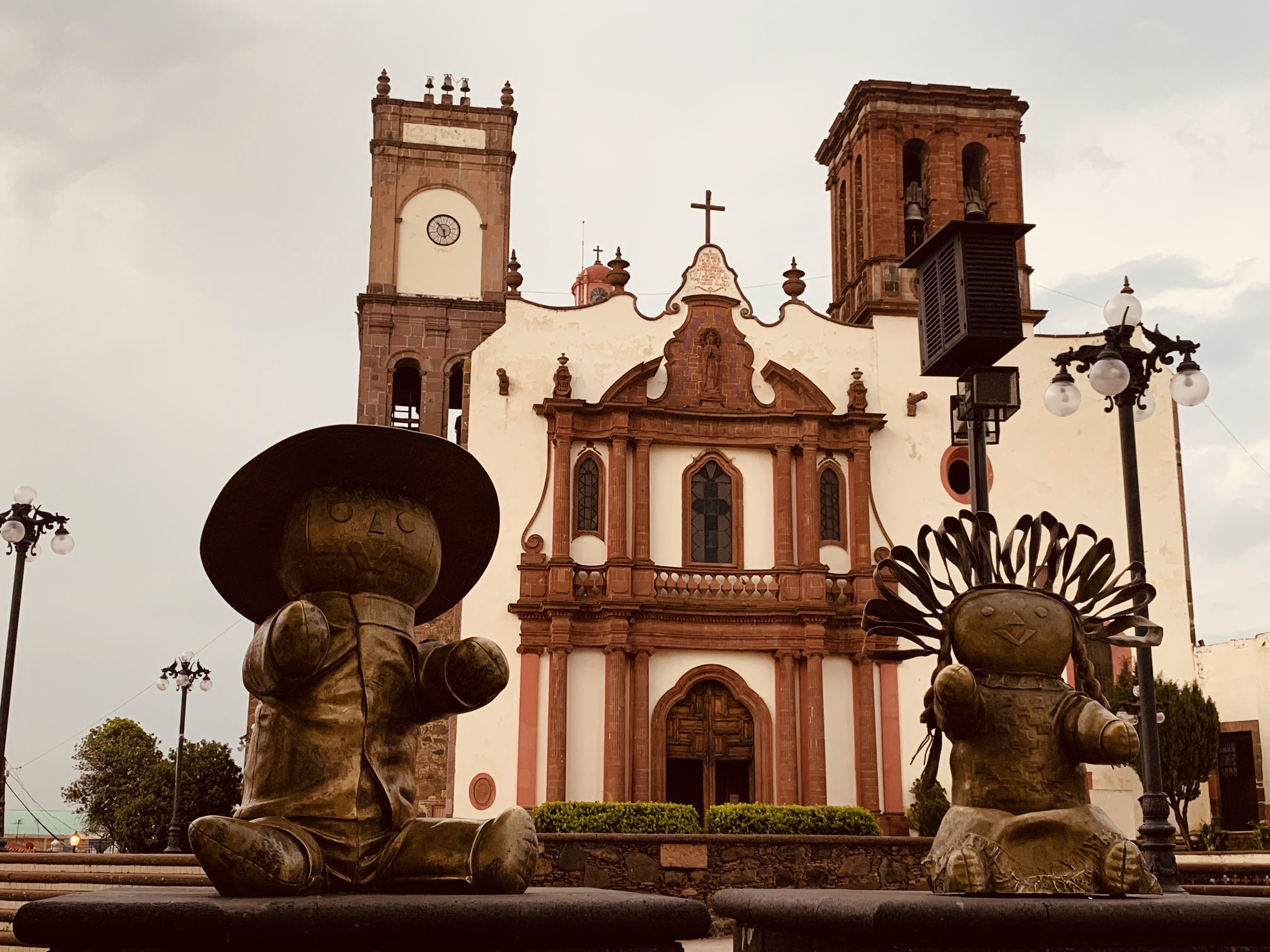 Se aprecian los muñecos tradicionales de Amealco en el centro del pueblo